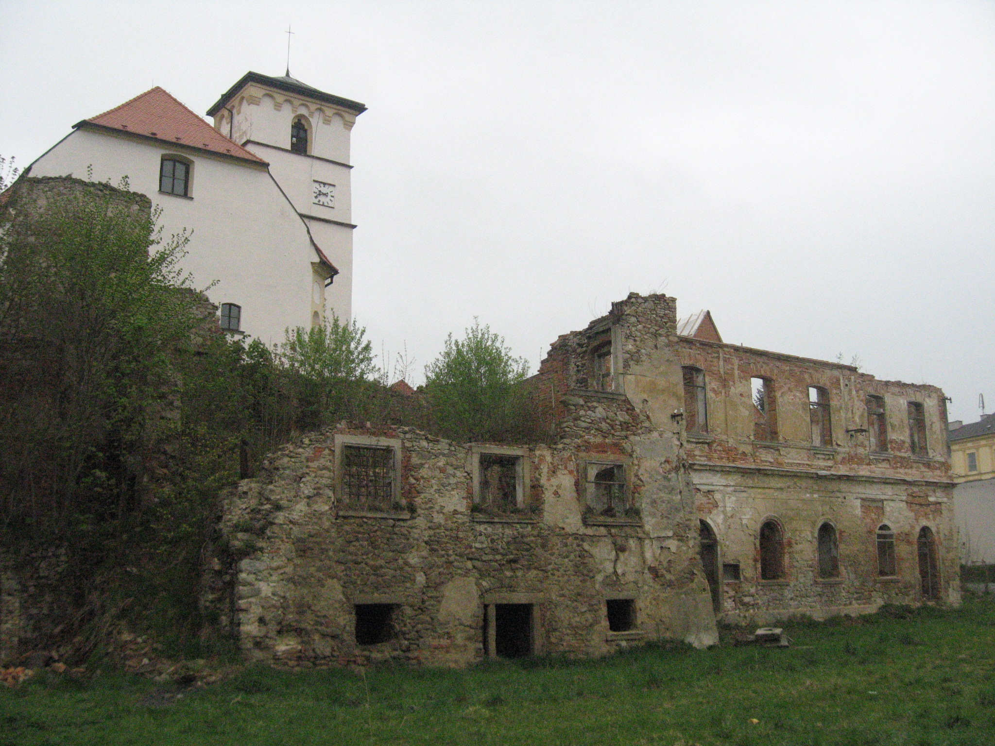 Zámek v Hazlově - stav 2011